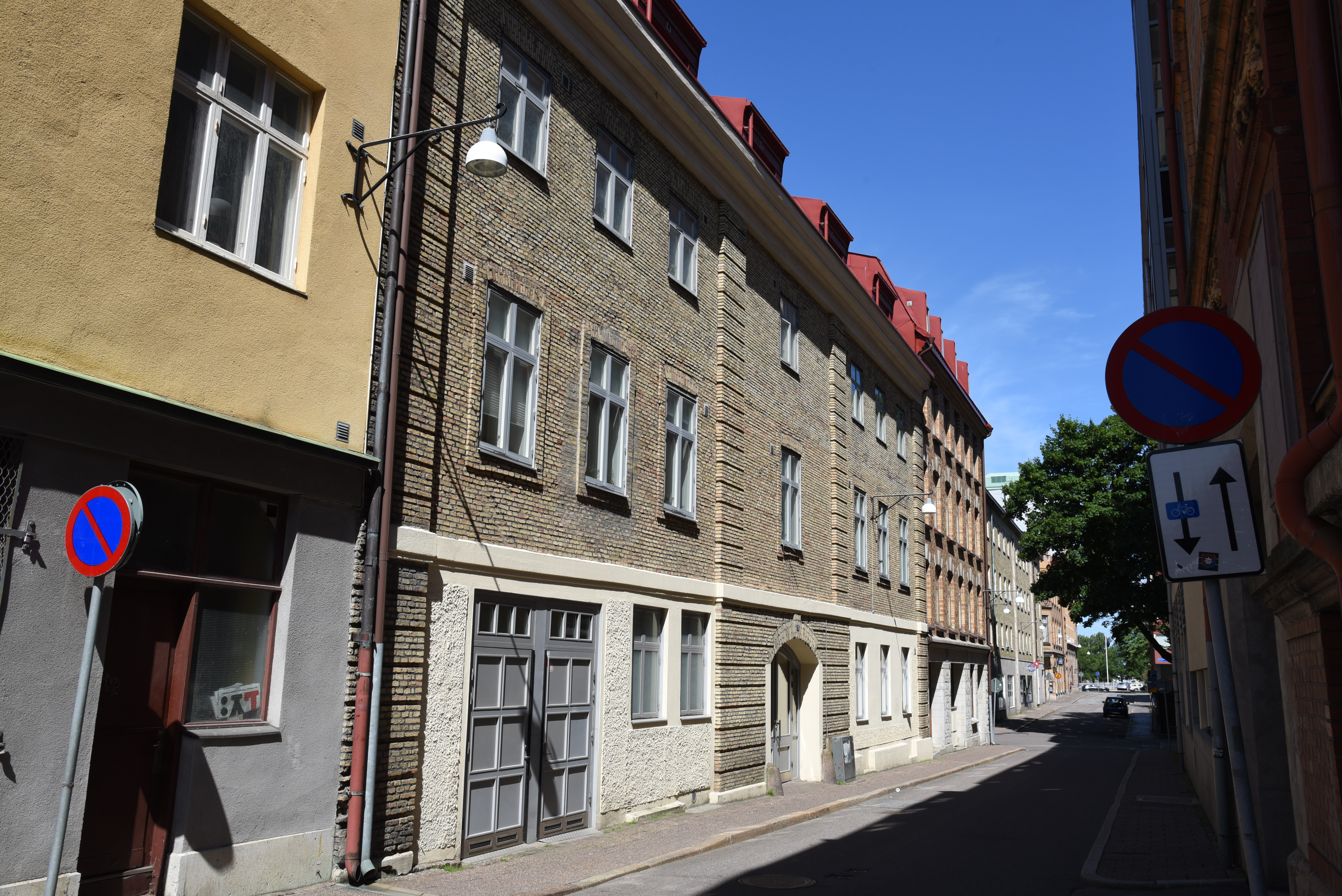 Smedjegatan 3 i Västra Nordstaden i Göteborg, sedd i riktning från Norra Hamngatan. Byggnaden skänktes av Martin Abraham Holterman till Götheborgs Arbetshus- och Fattigförsörjnings-Anstalt och benämndes då "Holtermanska baracken" ("Bracka").